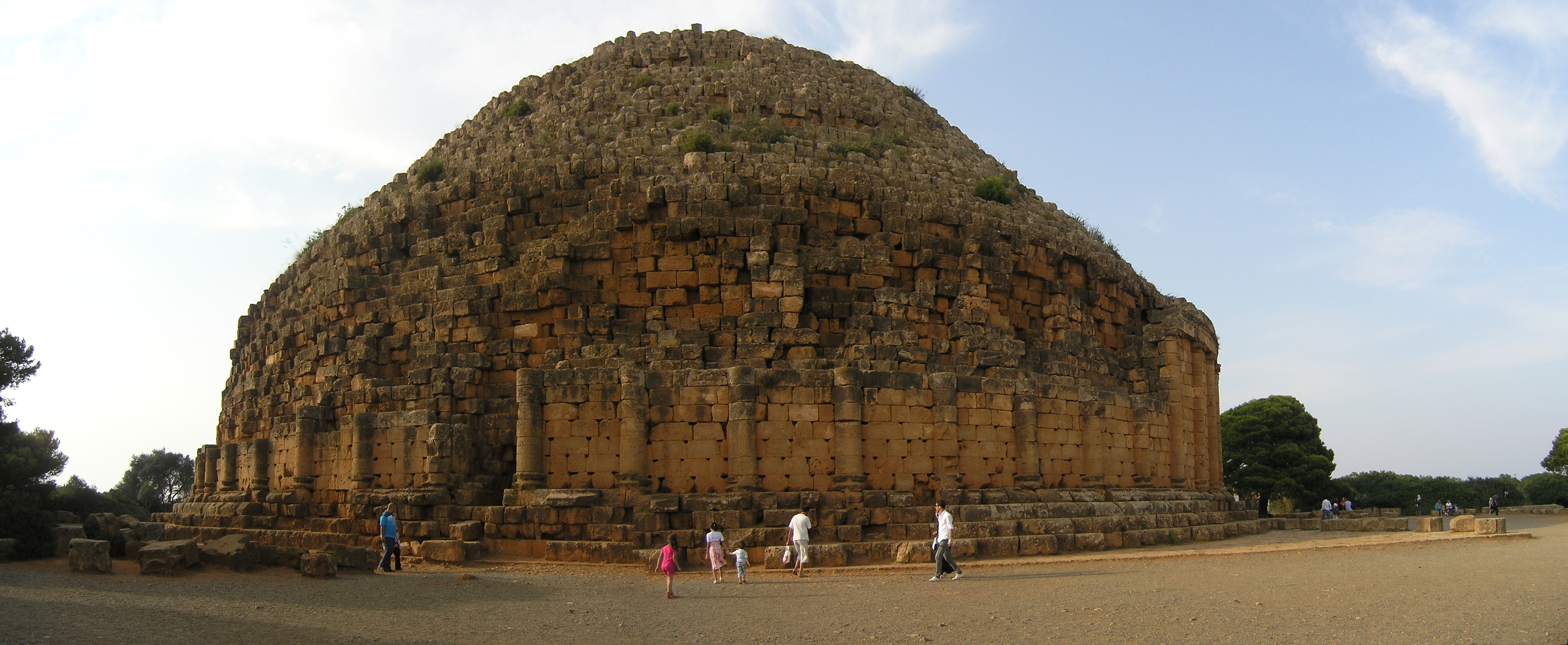 Mausolée royal de Maurétanie (Tombeau de la Chrétienne) Mon.Fun./Ant (Hadjout)